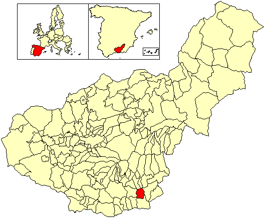 Situación del término municipal de Albondón respecto a la provincia de Granada, en España.